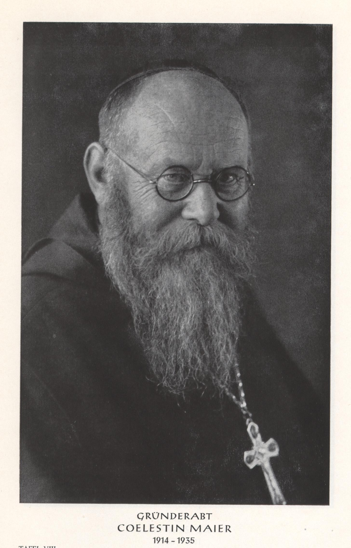 Cölestin Maier OSB, Gründerabt von Schweiklberg